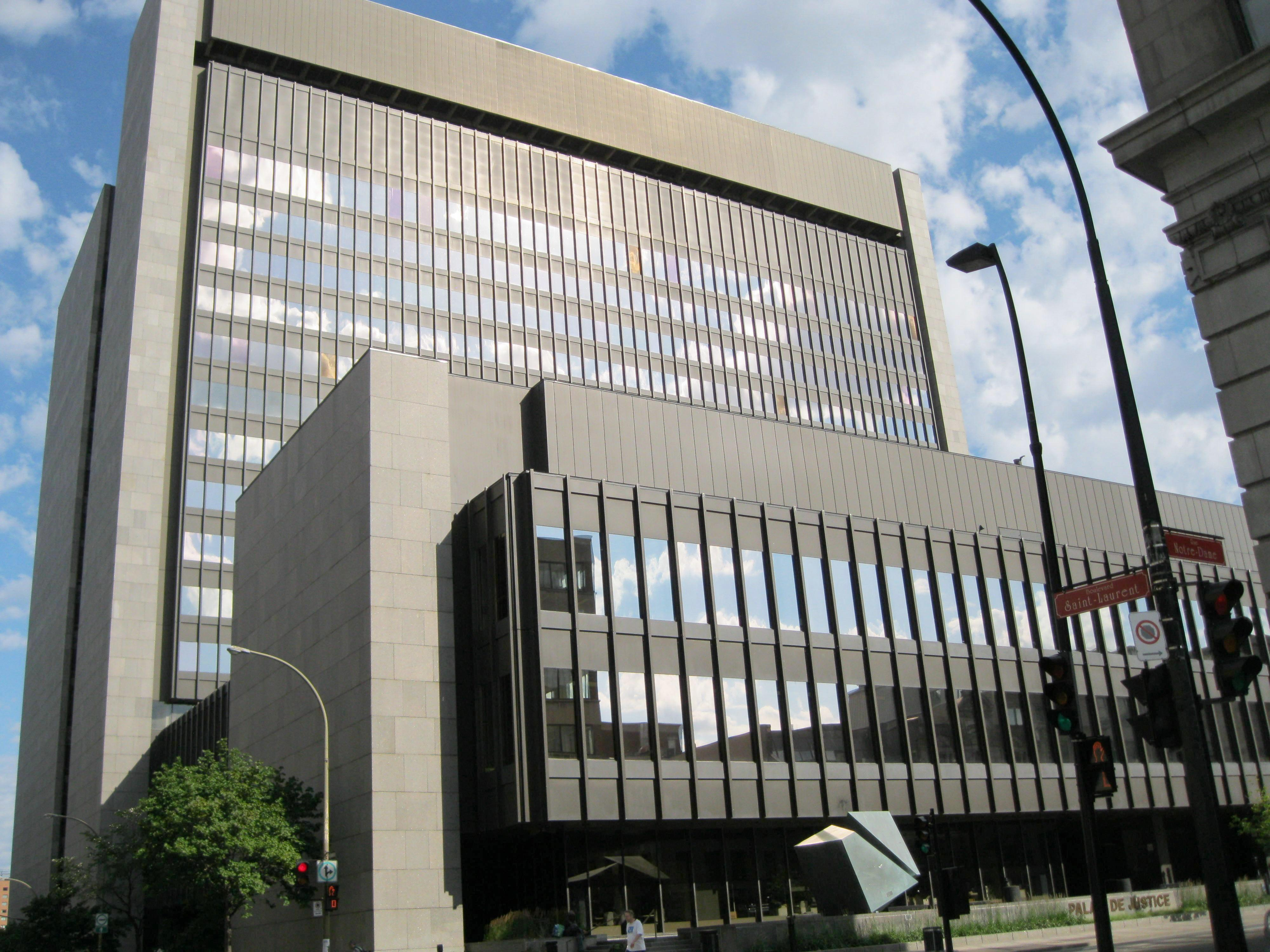 L'actuel palais de Justice de Montréal (le palais moderne) situé au 1 rue Notre-Dame Est, inauguré en 1971